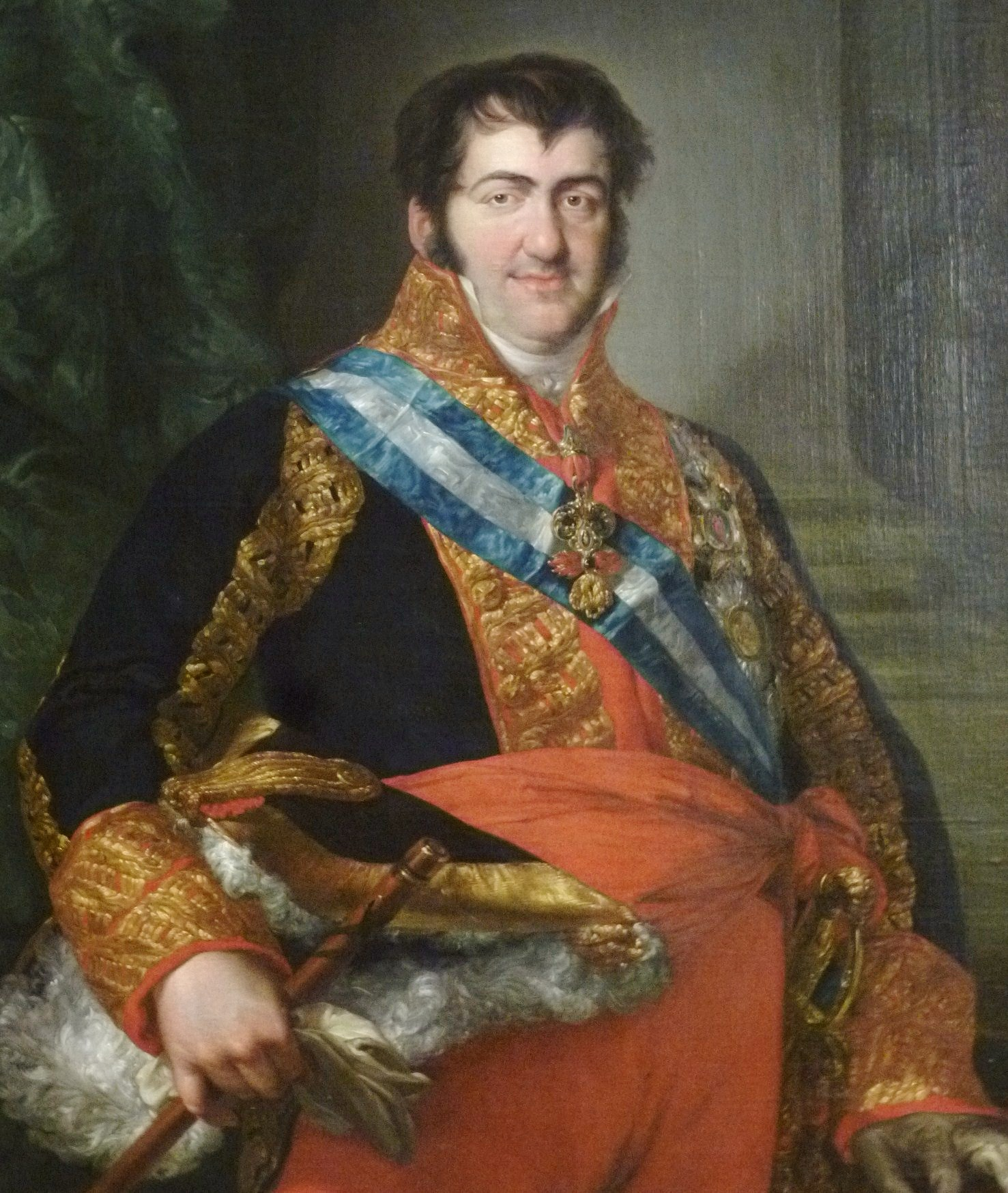 Retrato del rey Fernando VII de España (1784-1833), que era hijo del rey Carlos IV y de la reina María Luisa de Parma.